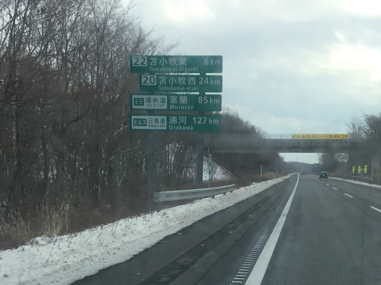 高速道路ナンバリング表記を含む案内表示（新千歳空港IC～苫小牧東IC間・2019年1月）